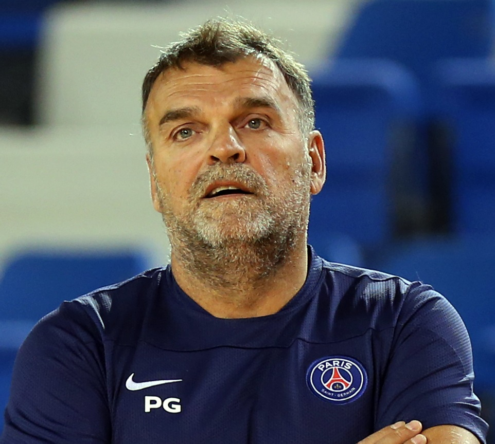 Philippe Gardent, entraineur du PSG Handball en 2013 à Doha